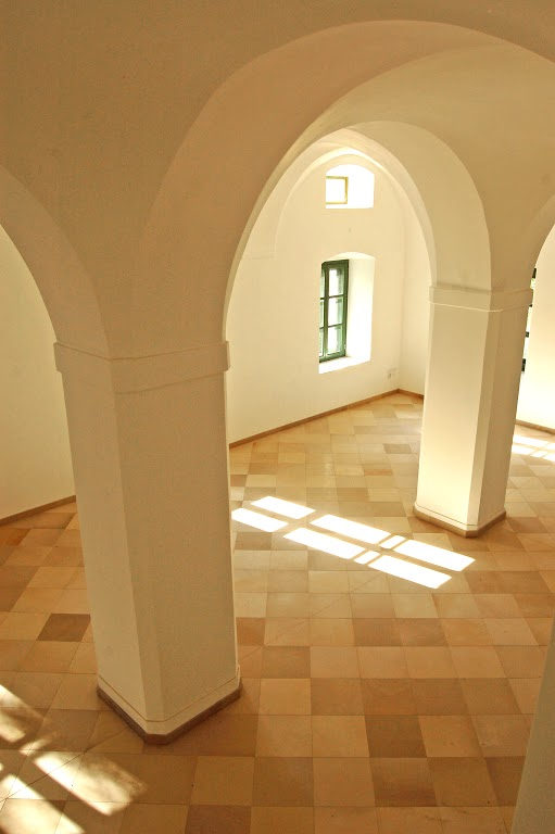 A billegpusztai Balogh-Esterházy kastély főépületének földszintje